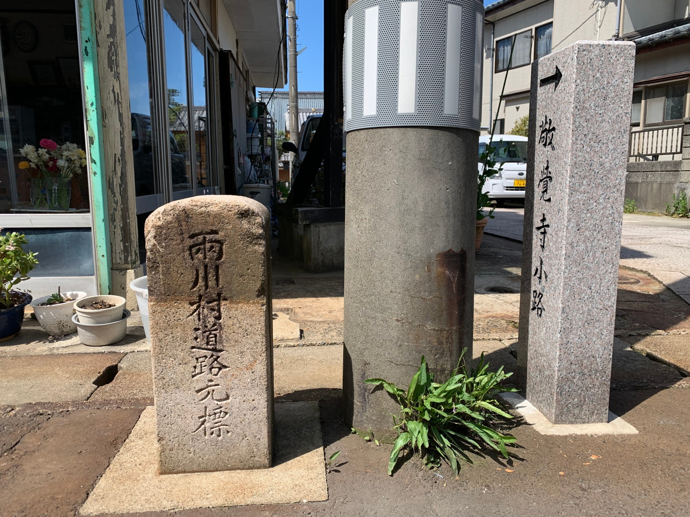 両川村道路元標（新潟市江南区，2020年5月）